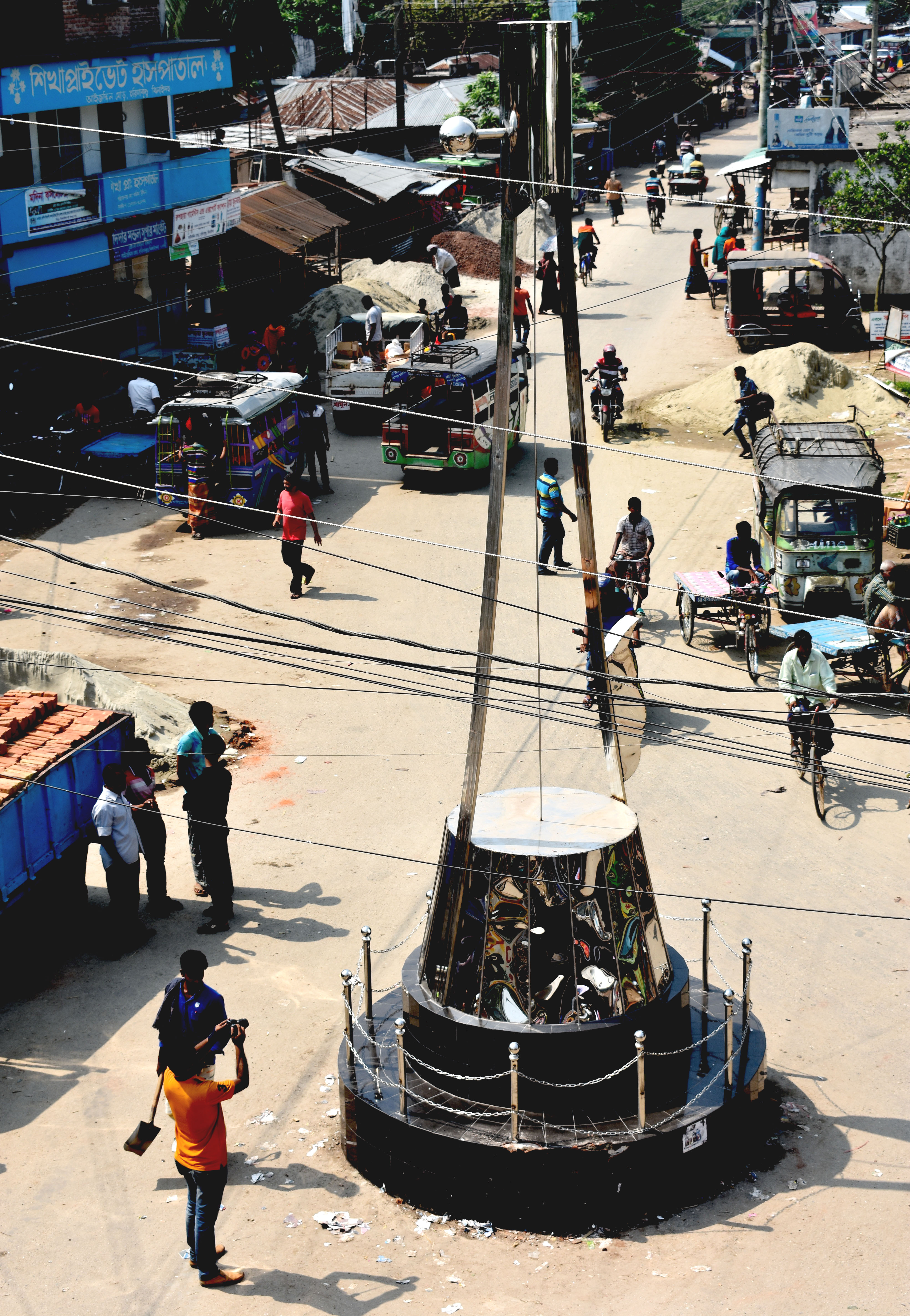 একতারা ভাষ্কর্য-1